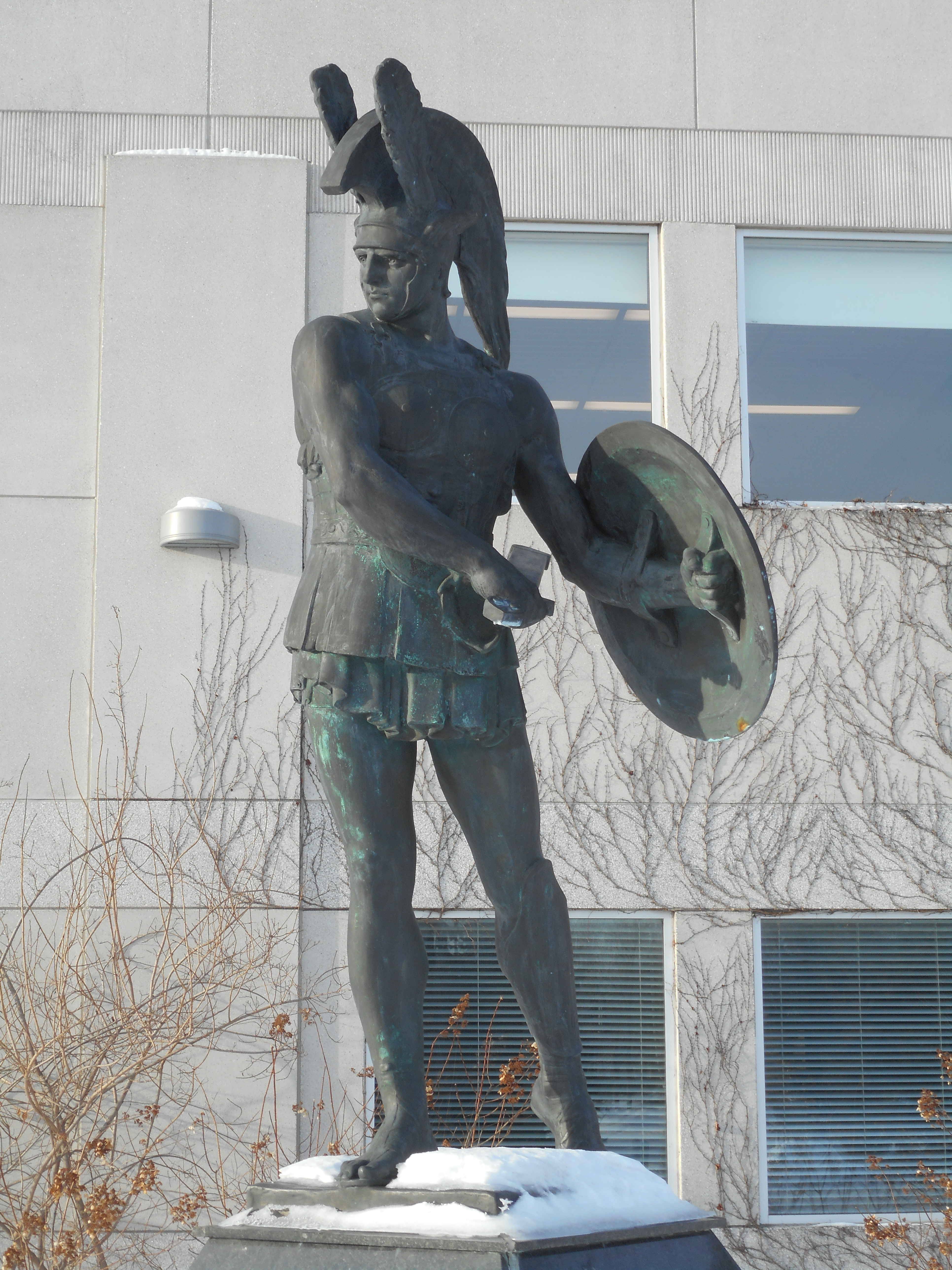 Devant le Centre Leonardo da Vinci, à Montréal, se dresse une statue en bronze d'un gladiateur. Il sagit d'une copie d'une sculpture réalisée en 1922 par Giuseppe Guastalla (1867-1952) pour un monument aux morts de la guerre installé à Pietrabbondante, une commune de la région de Molise en Italie. Elle représente un guerrier samnite. Sur la plaque est gravé : « Le guerrier samnite, symbole d'union des molisans dans le monde, emblème de fraternité entre les peuples. »